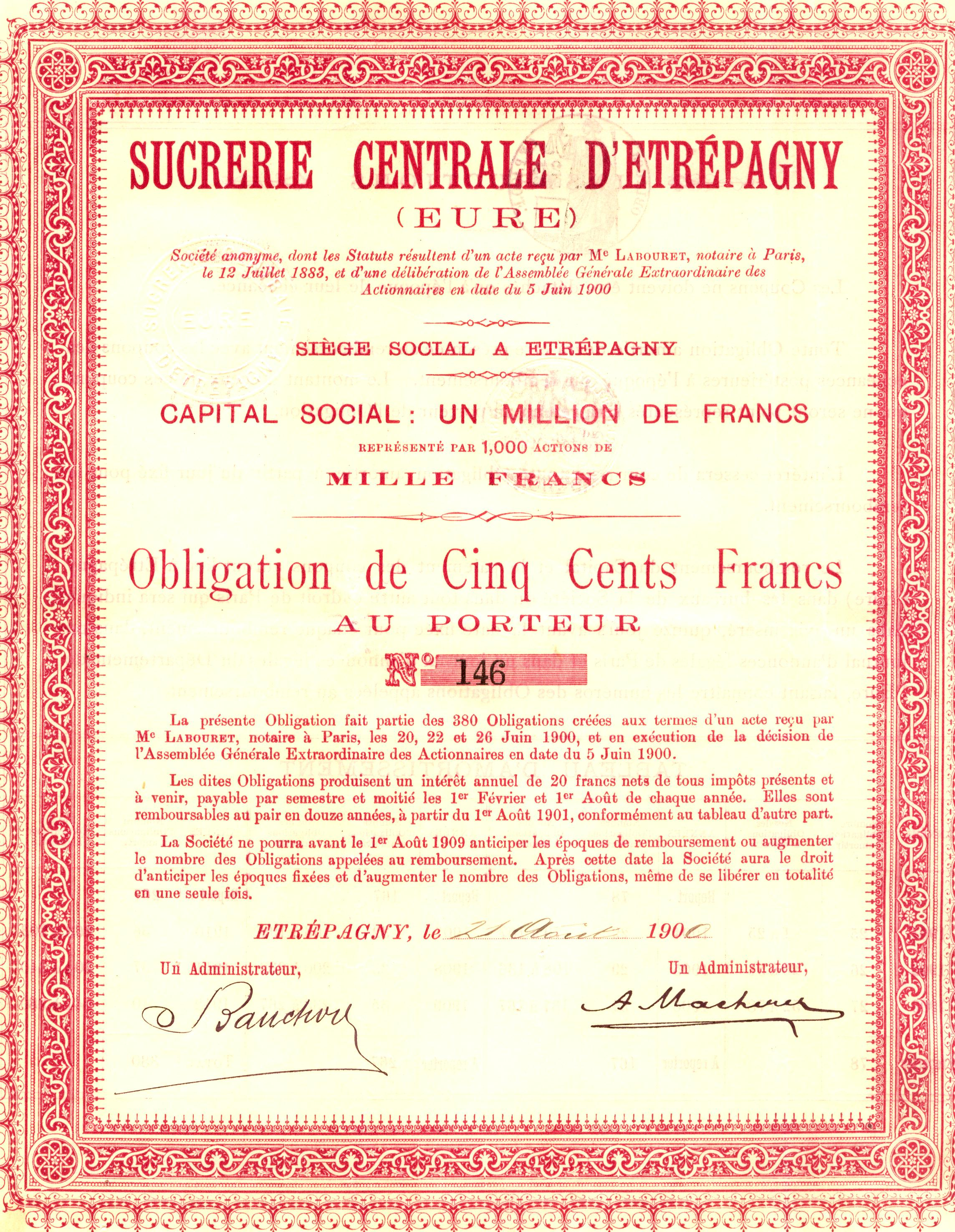 Un titre obligataire de la sucrerie Centrale d'Étrépagny en 1900